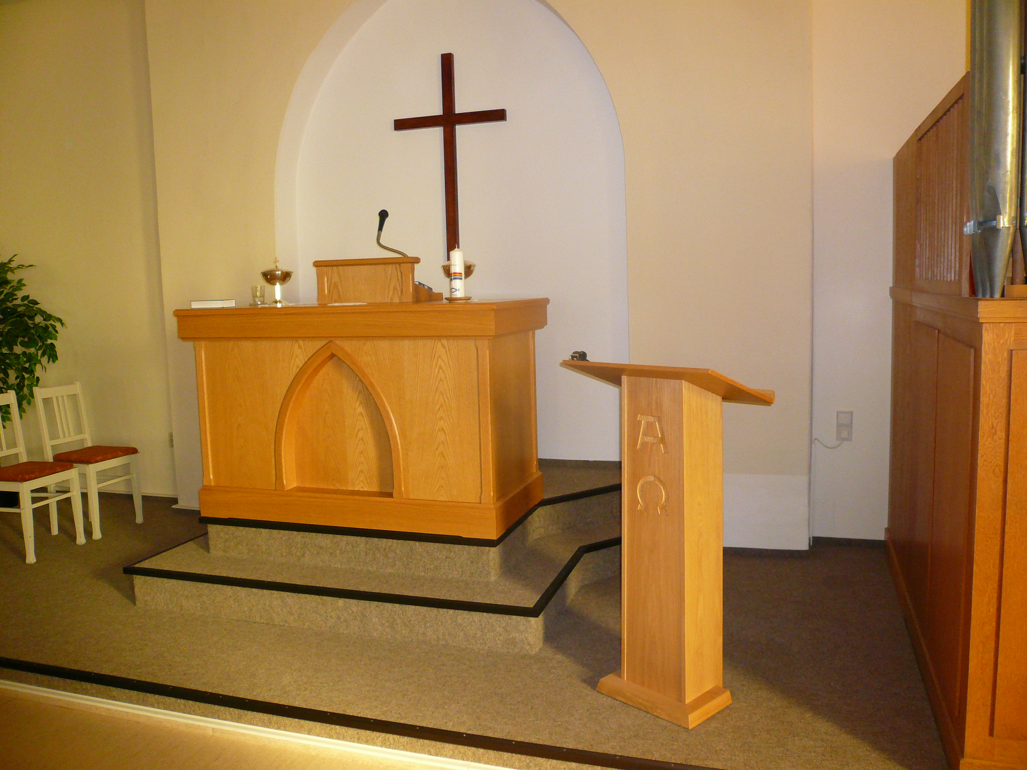 Altarbereich Apostolische Gemeinschaft - Gemeinde Greiz